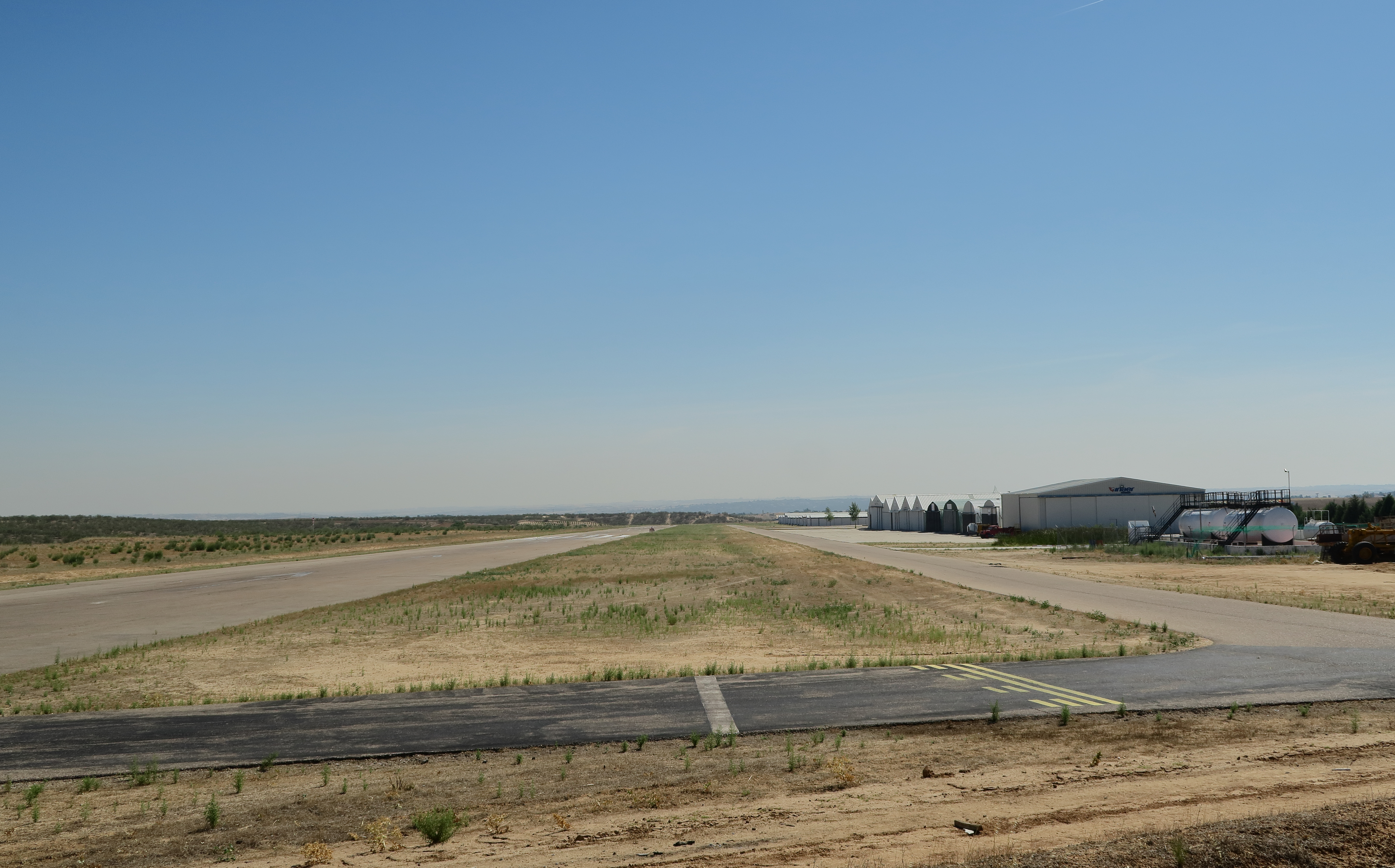 Aeródromo de Casarrubios del Monte, vista de la pista